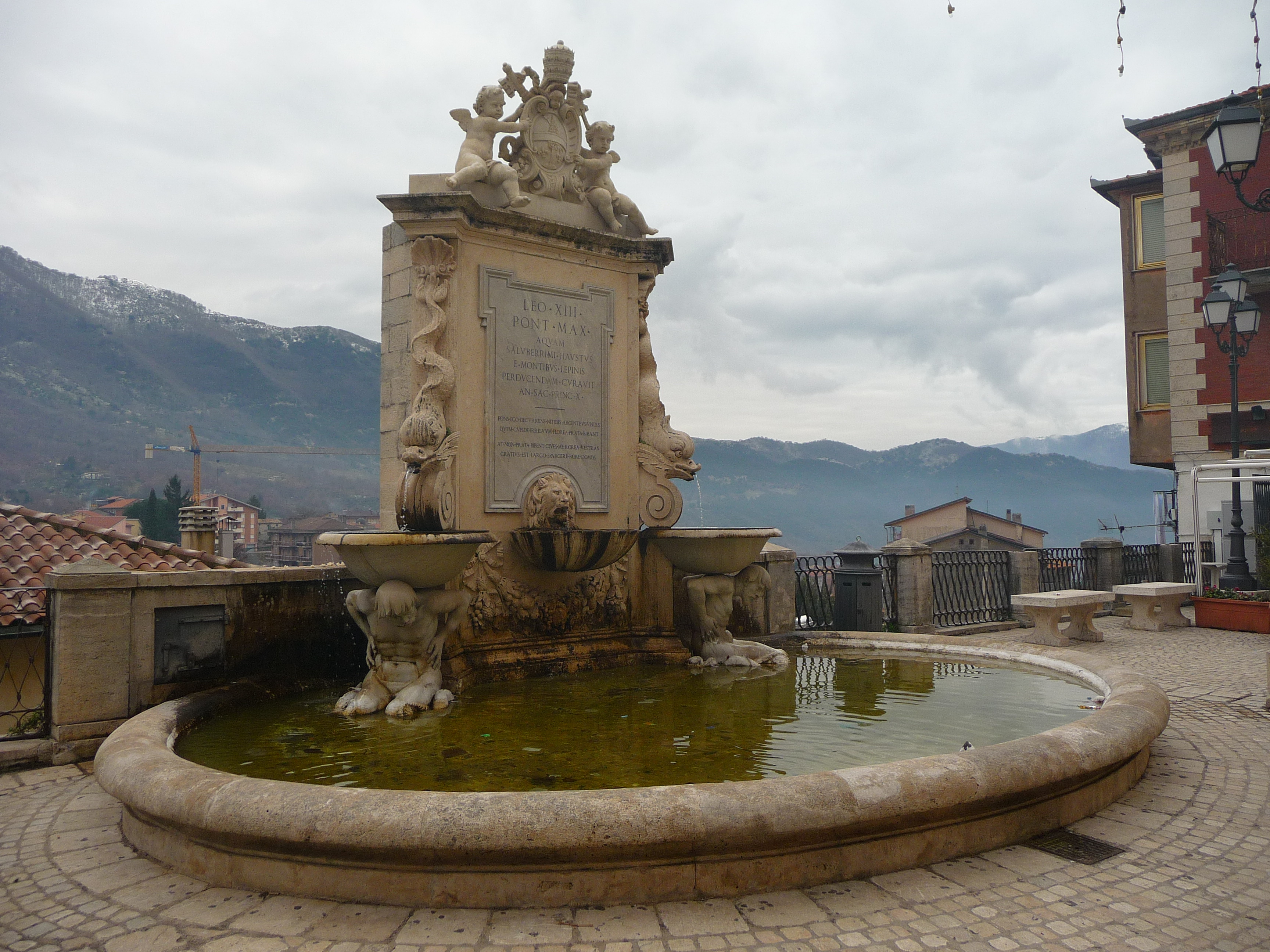 La fontana